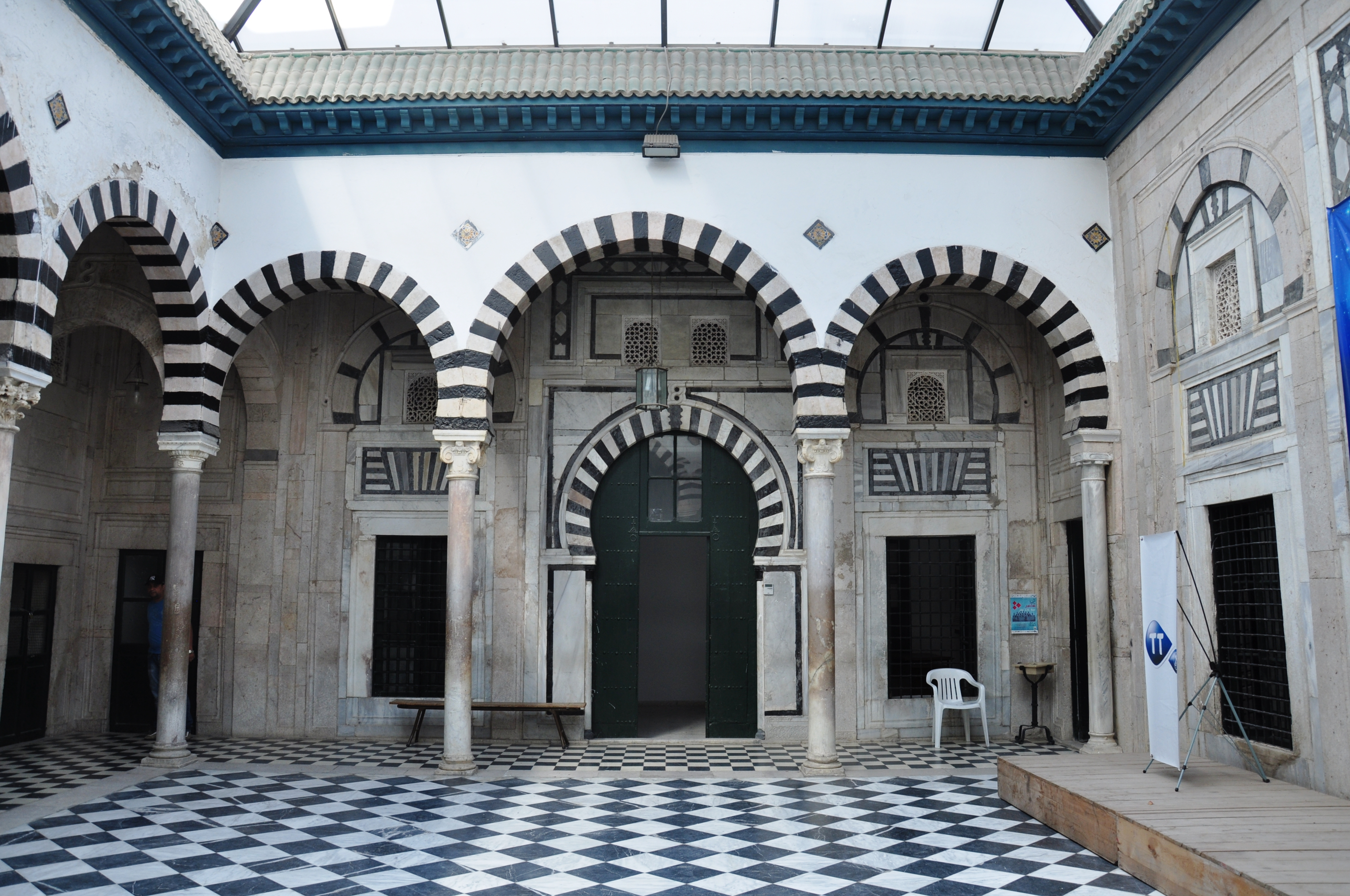 Dar Errachida